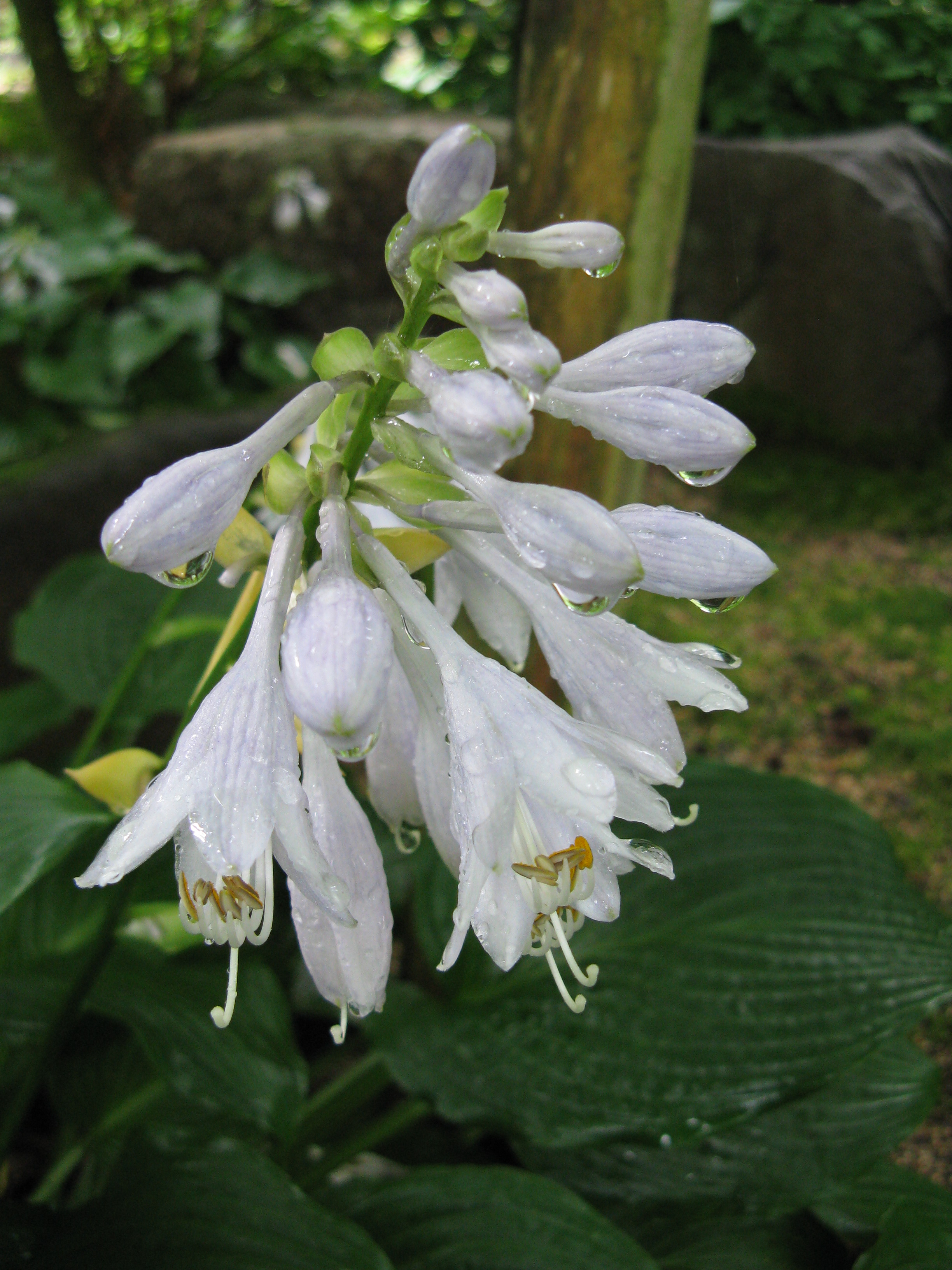 Hosta sieboldiana